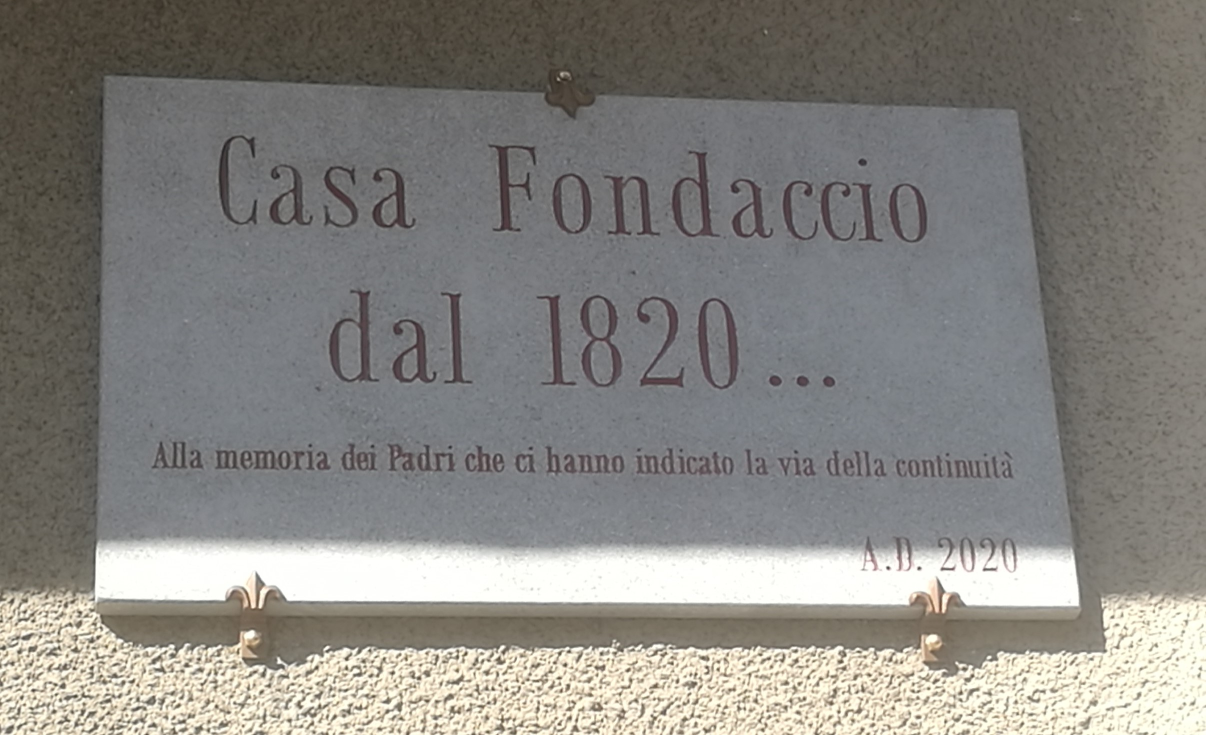 Targa Commemorativa